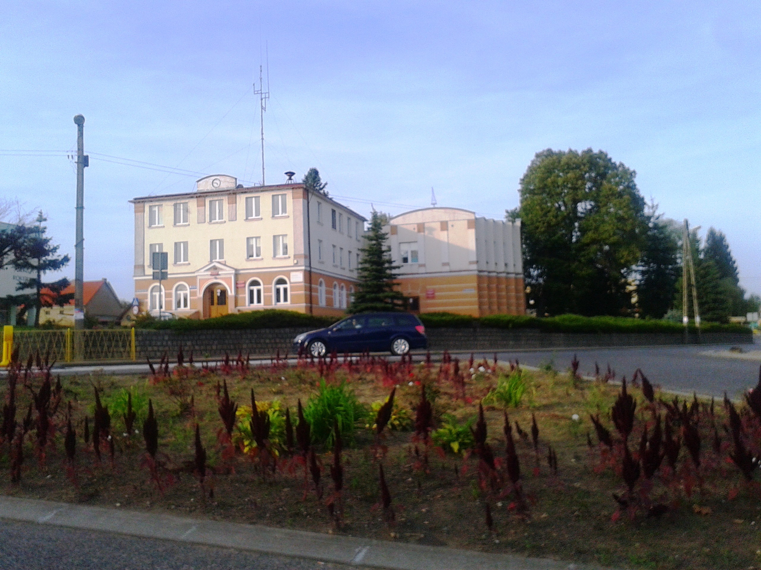 Urząd Miejski w Płotach